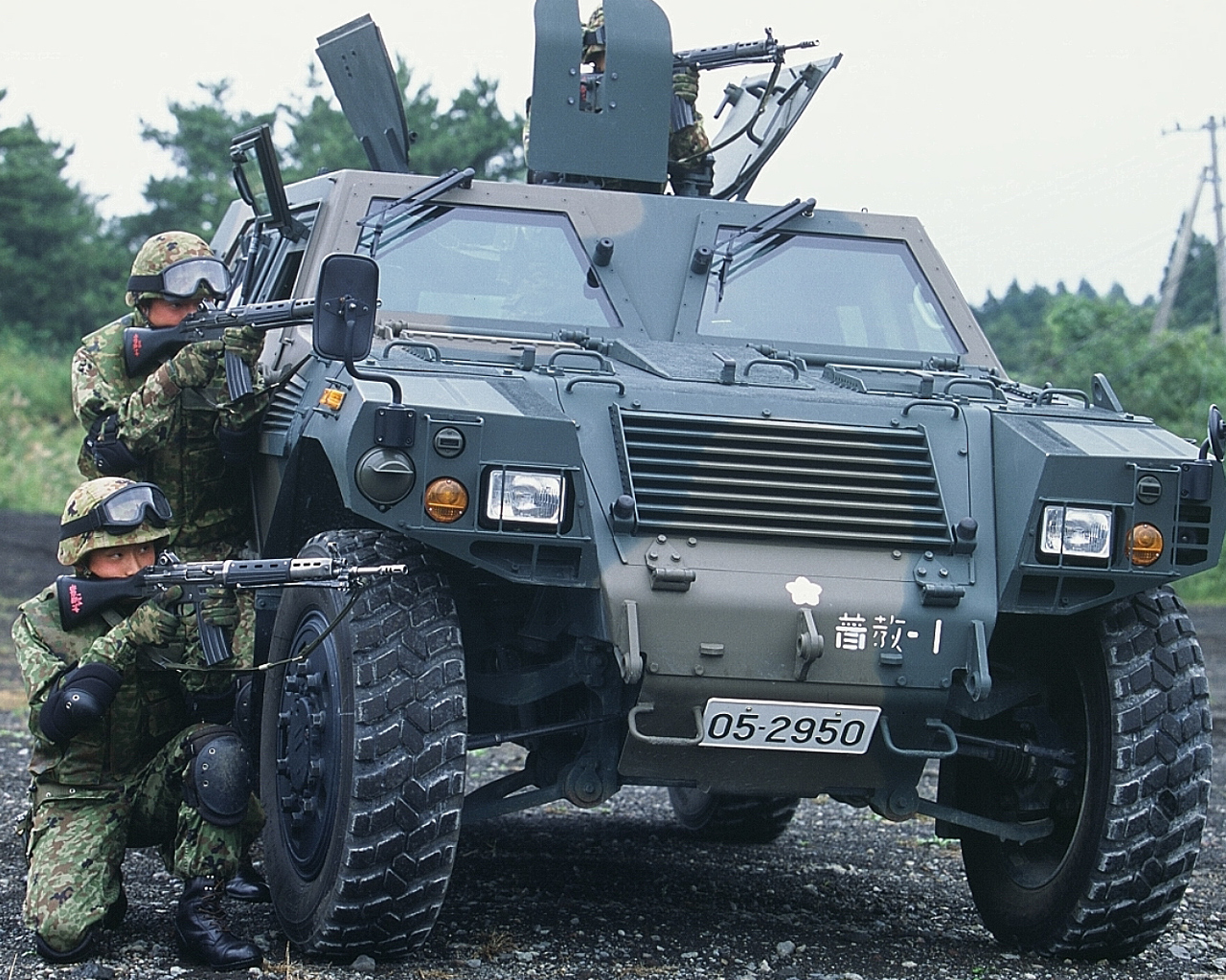 略称：LAV 愛称：ライトアーマー [乗員]4人 [空車重量]約4.5t [全長]4.4m [全幅]2.04m [全高]1.85m [最高速度]100km/h [開発]防衛庁技術研究本部 [製作]小松製作所 主として普通科部隊などに装備し、戦略機動および戦場機動などに使用される。固有の搭載火器はないが、普通科部隊などが装備する、5.56mm機関銃の車載射撃および軽対戦車誘導弾の車上射撃が可能である。